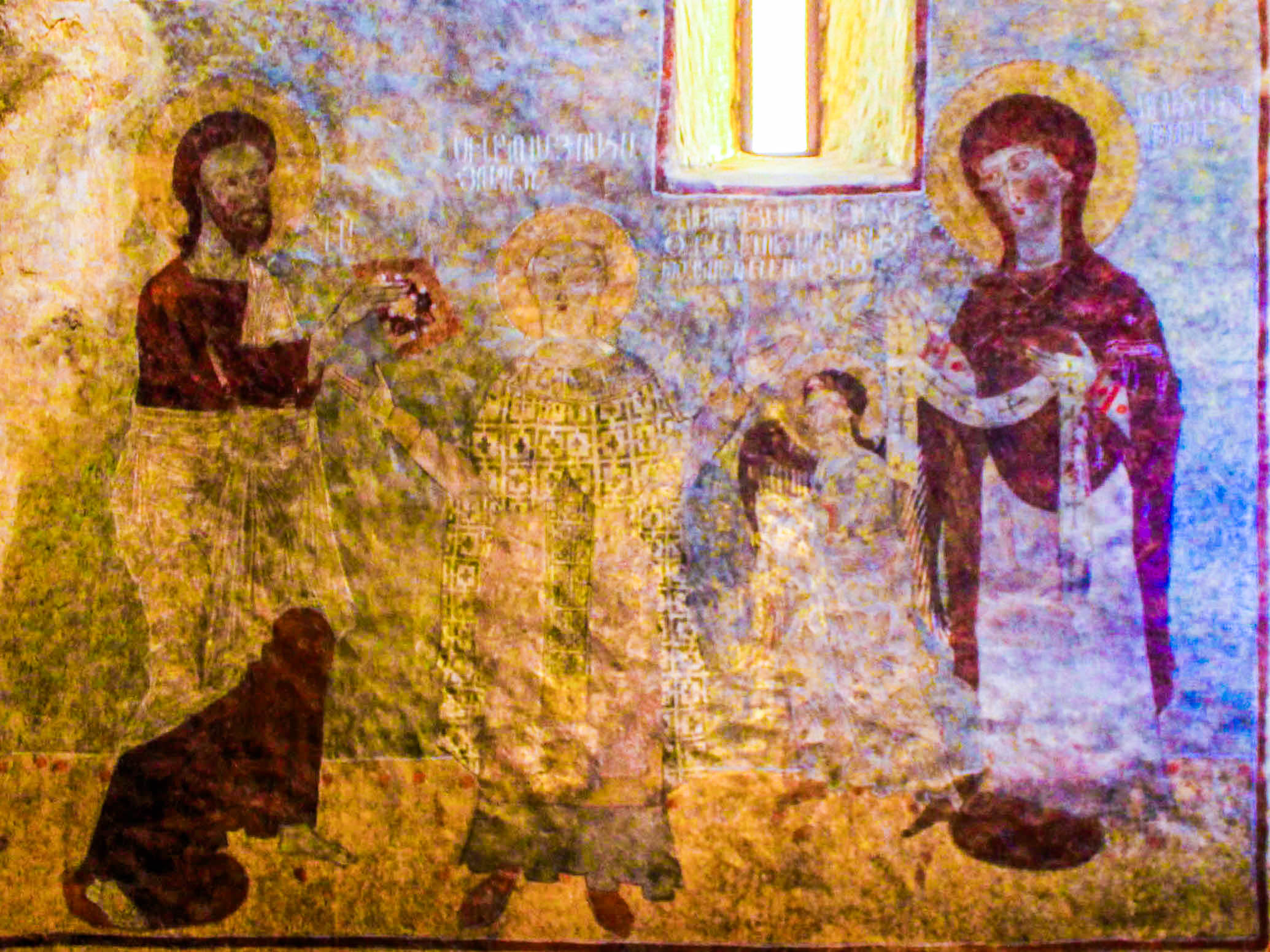 Xudavəng kilsəsində freska